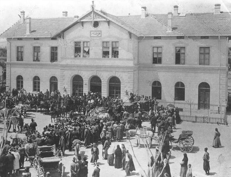 Türkei, Konia, Empfang des deutschen Botschafters Konia, Kleinasien.- Empfang des deutschen Botschafters Marschall von Bieberstein Der Botschafter u[nd] s[eine] Begleitung kamen, um die fertiggestellte erste Teilstrecke der Bagdadbahn, Konia-Karaman zu bestätigen. [Sommer 1904] Abgebildete Personen: Marschall von Bieberstein, Adolf Freiherr: Botschafter in der Türkei, Staatssekretär im Auswärtigen Amt, Deutschland (GND 118782096)